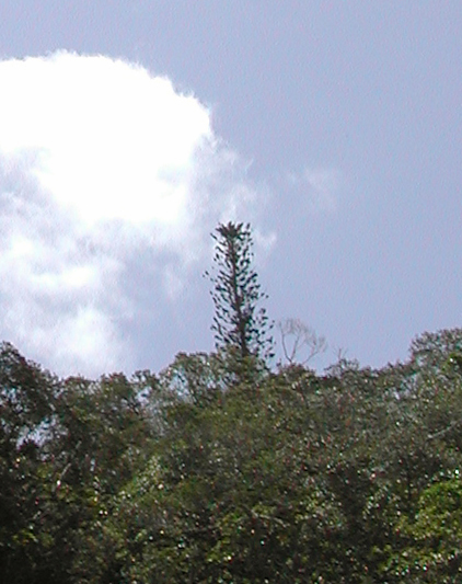 Araucaria bernieri, Yaté, New Caledonia